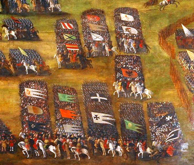 Битва при Клушине (фрагмент картины).